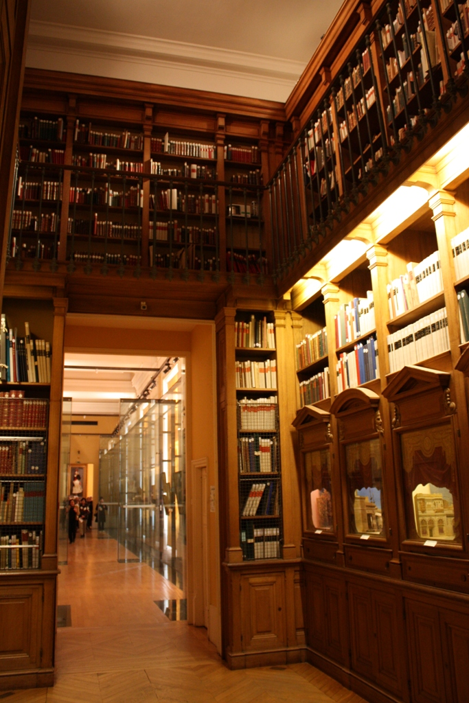 Bibliothèque-Musée de l'Opéra National de Paris